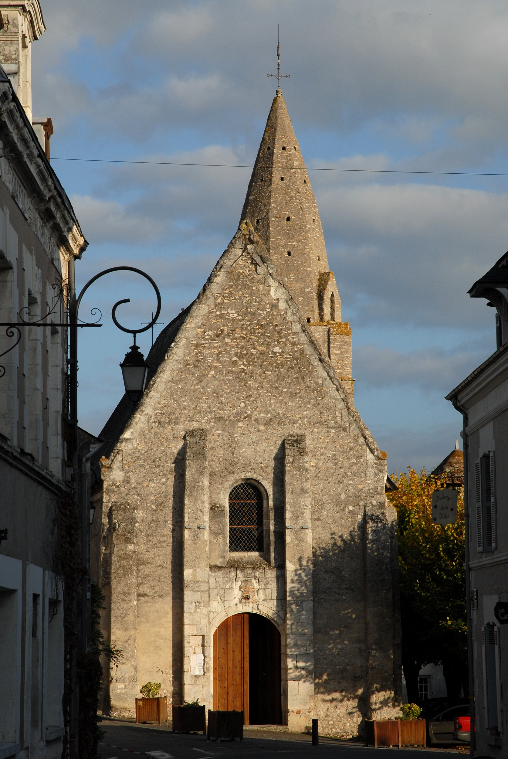 Vue depuis la rue du Commerce en fin de journée.